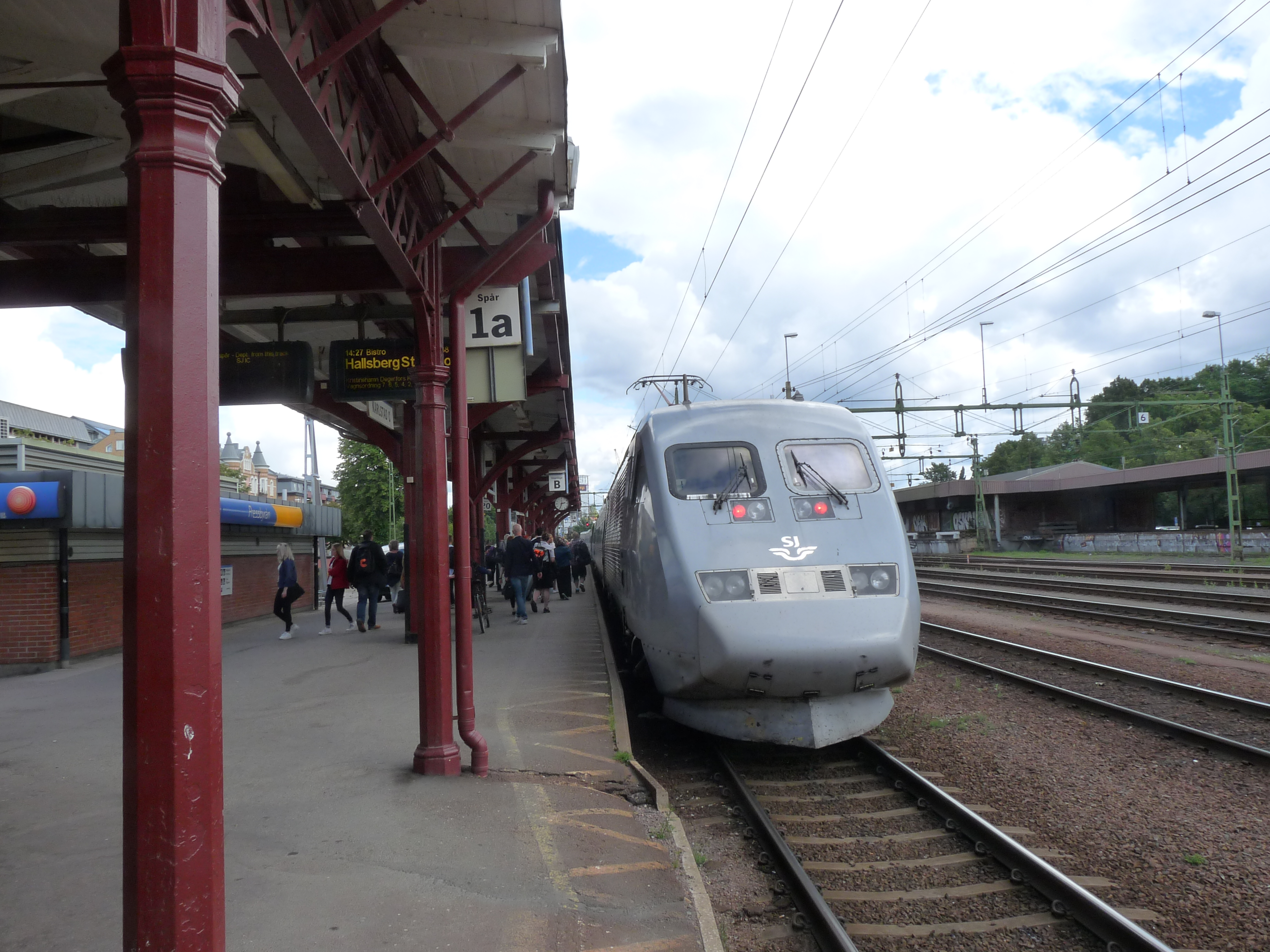 Treinen in Karlstad station